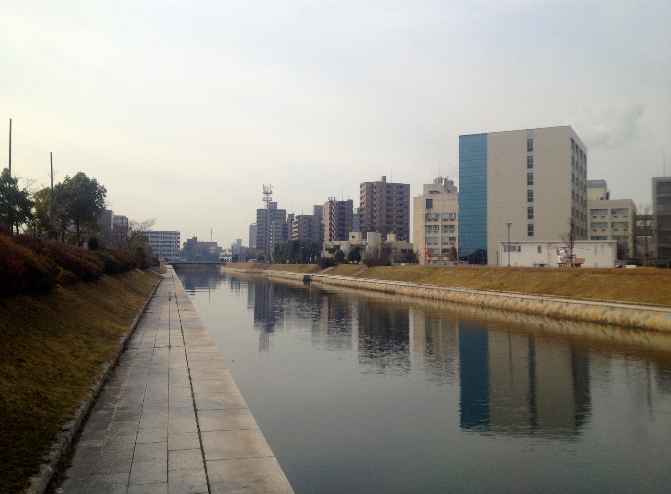 真締川公園親水デッキより真締川下流方面。2011年12月28日撮影。